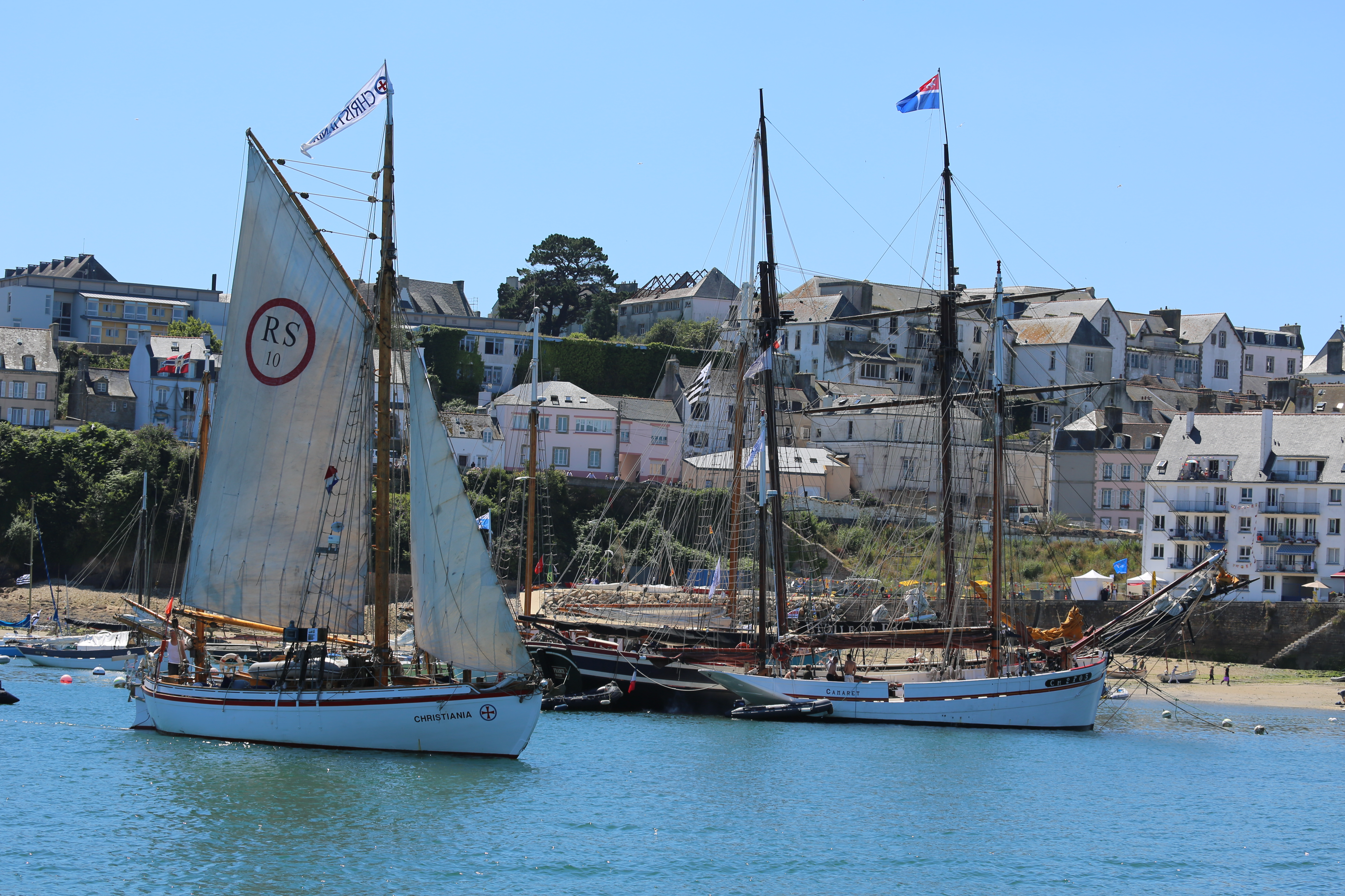 Temps de fêtes Douranenez 2012. Ancien canot de sauvetage norvégien RS 10 Christiania.